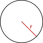 Straal van een cirkel - gemaakt door Wilinckx met behulp van Dia, The Gimp en optipng. Indien er copyright kan vallen op zulk een eenvoudige afbeelding plaats ik deze afbeelding hierbij in het publiek domein